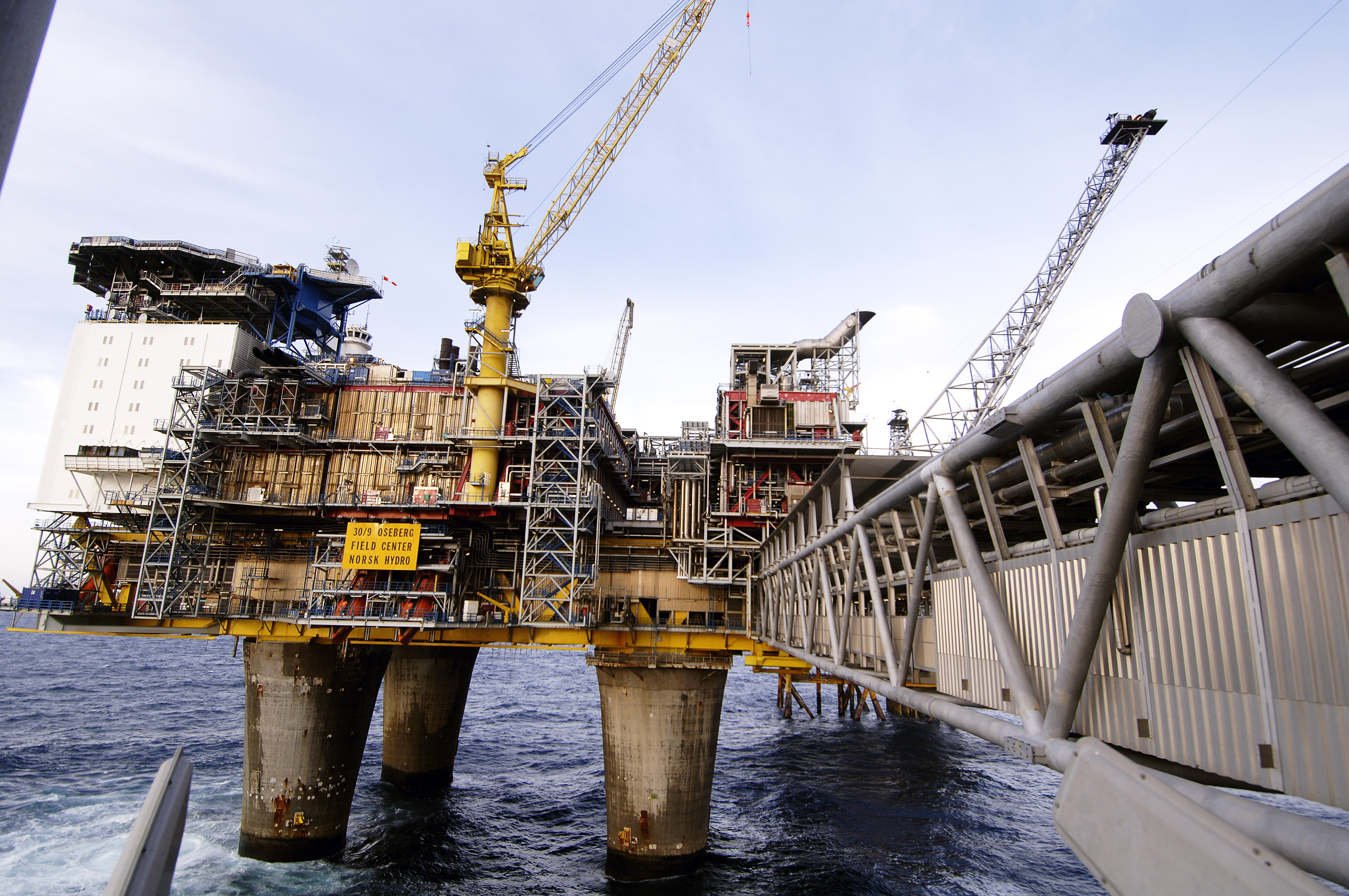 Foto: OLF/Tom Haga